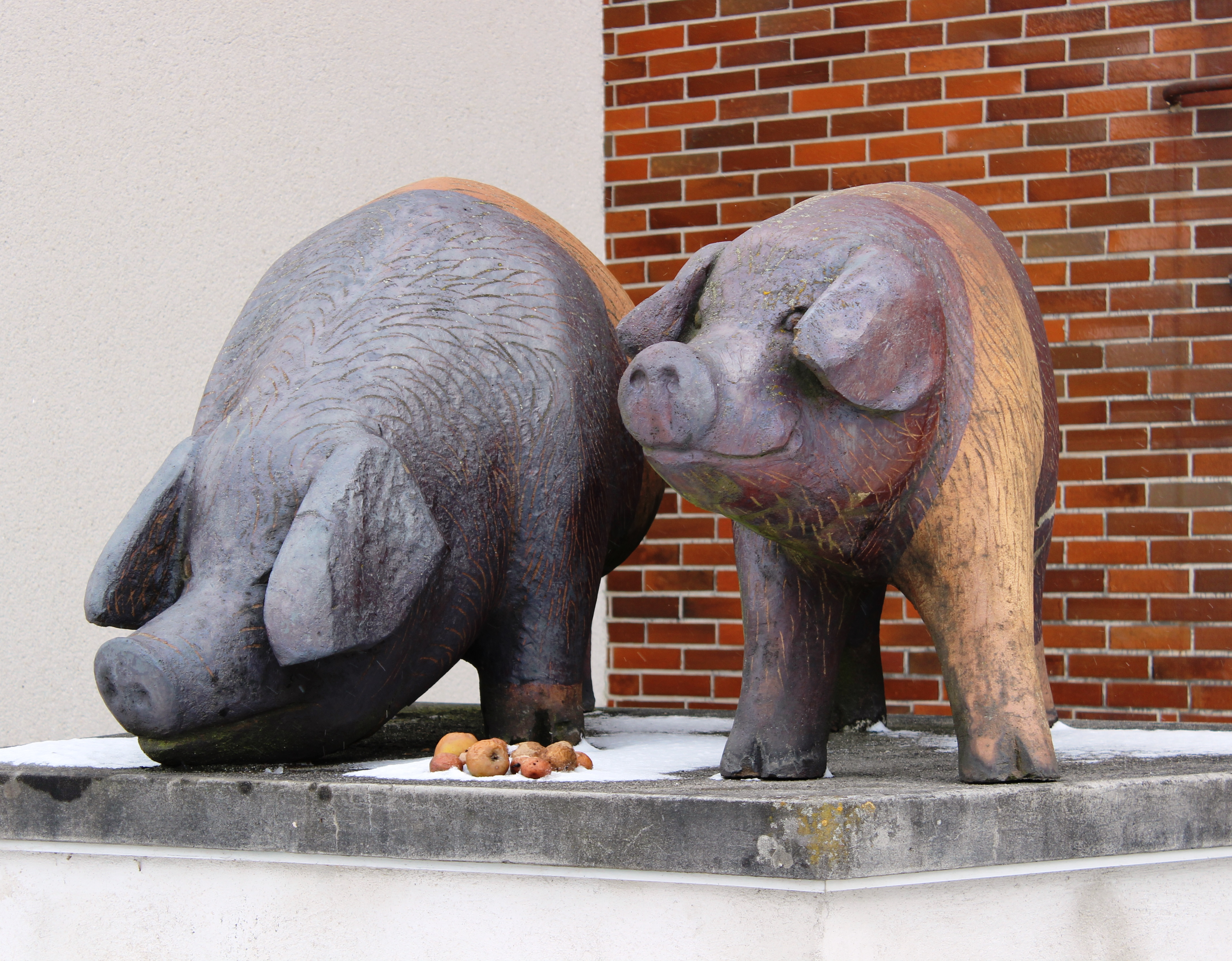 Pomník Přeštické černostrakaté prase. Přeštice v okrese Plzeň-jih, kraj Plzeňský. Česká republika.